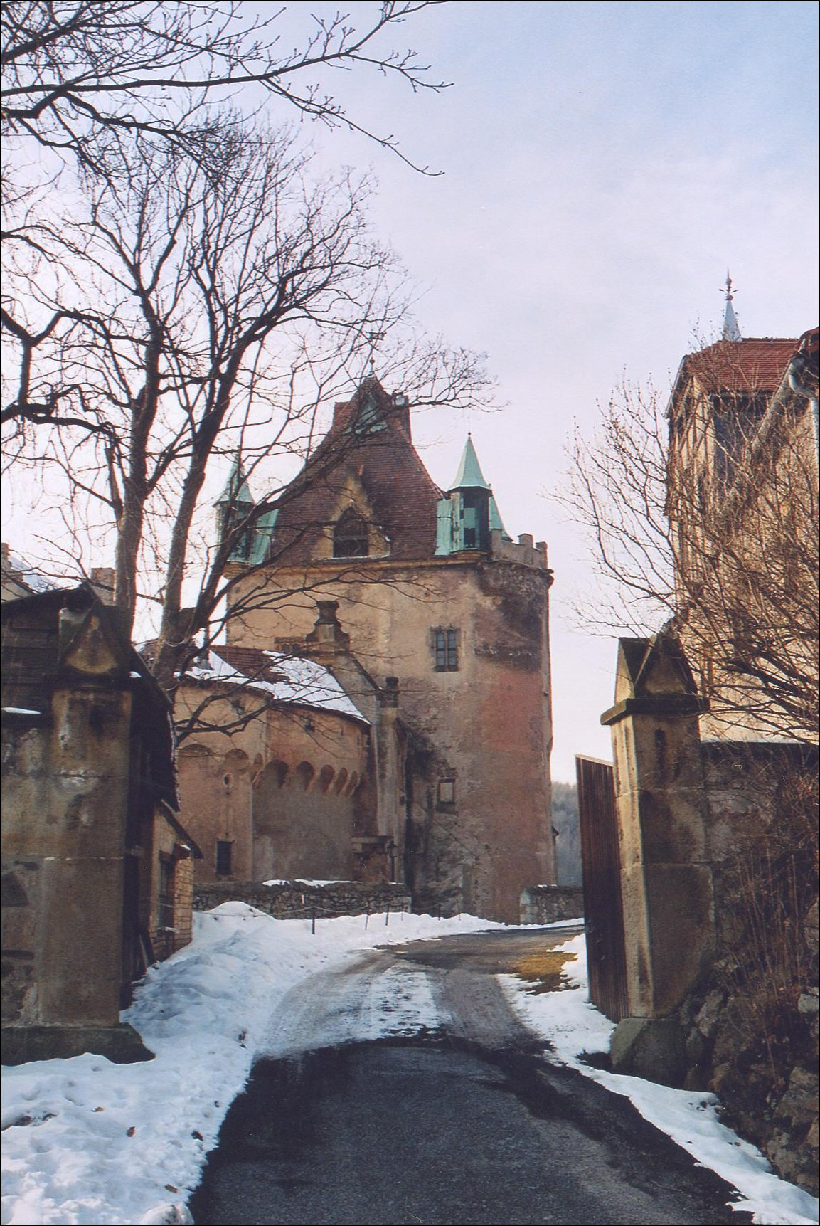 Schloß Kuckuckstein in Liebstadt: Eingangsbereich